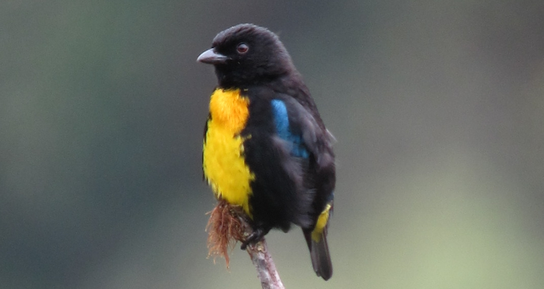 Carmen de Atrato, Chocó, Colombia RNA Las Tangaras de Proaves